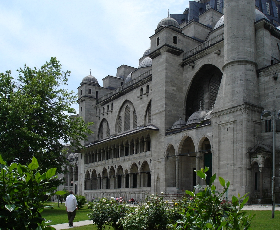 L'imponente finaco sinistro della Moschea di Solimano il Magnifico ad Istanbul. La moschea sorge al centro di un giardino. Foto di: Giovanni Dall'Orto, 26-5-2006. New version by Dr. 91.41